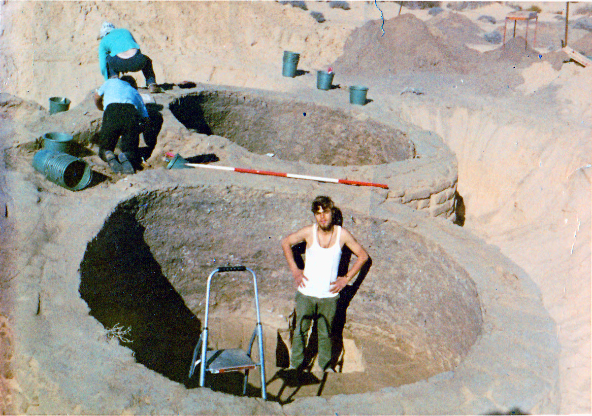 חפירות ביר אל עבד בסיני